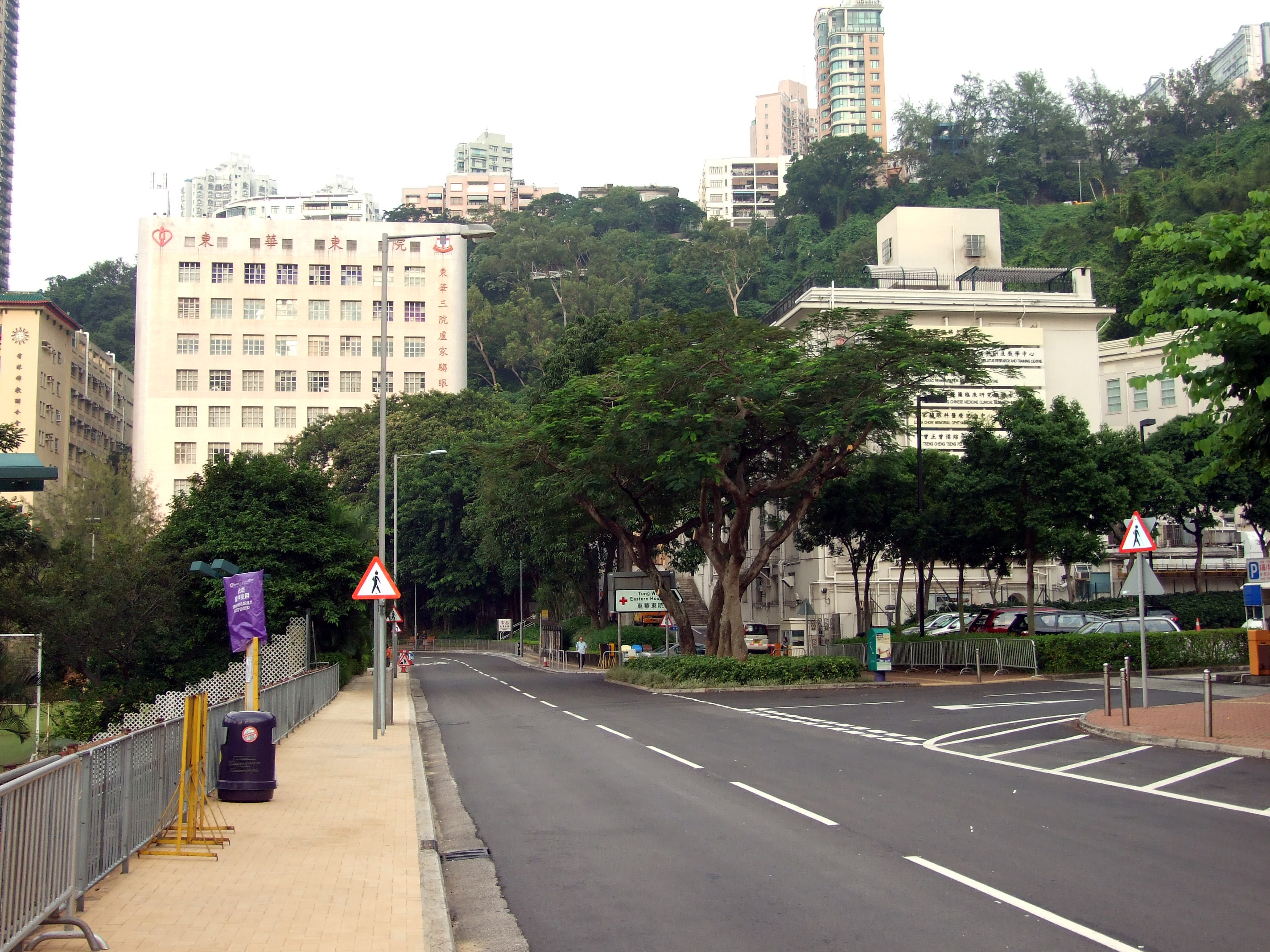 中文（香港）: 東華東院。